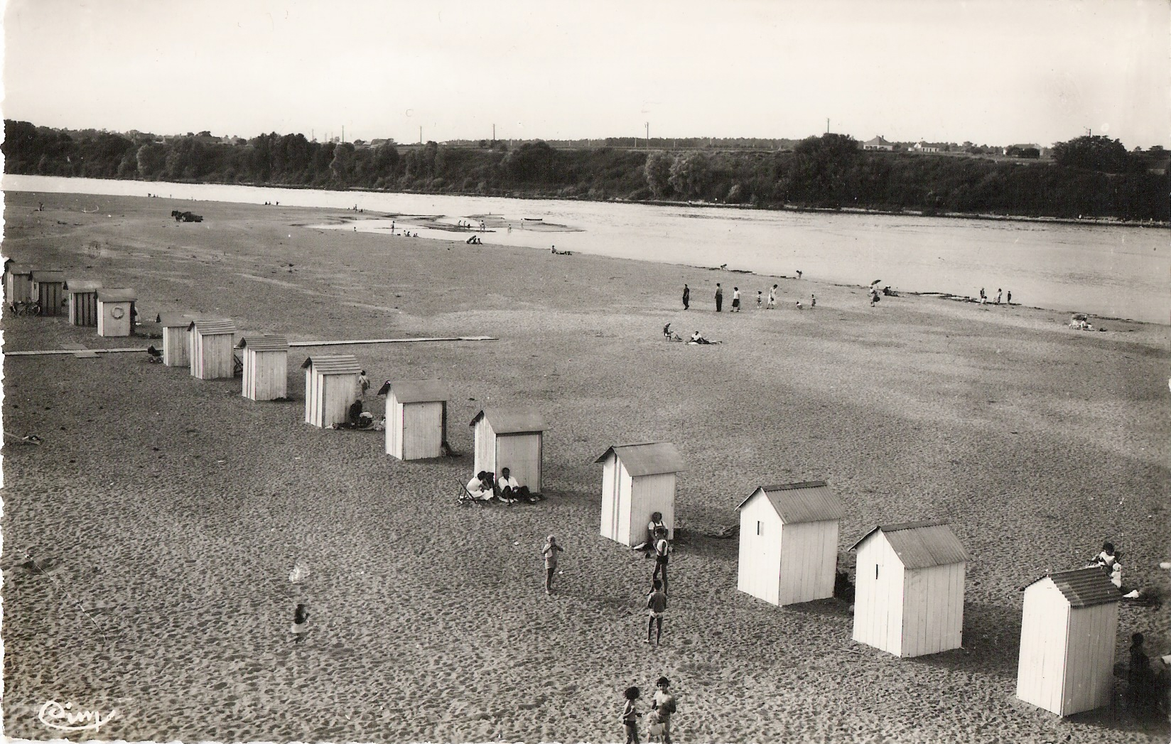 La plage du bord de Loire à Jargeau, Loiret, France